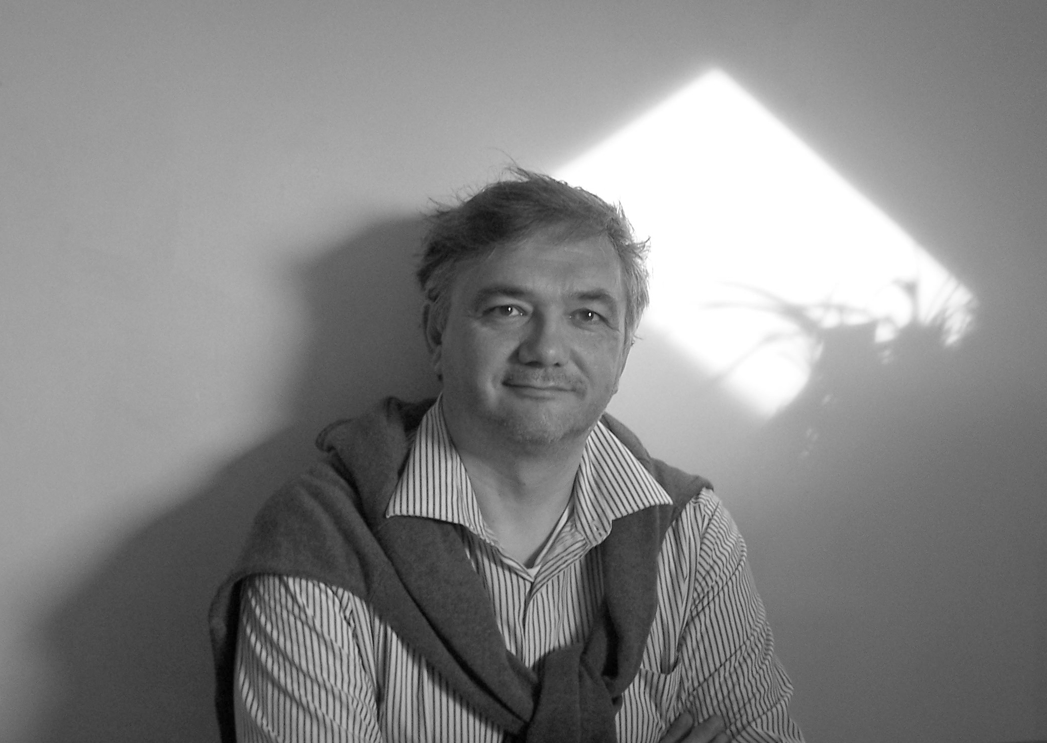 L'auteur Jean-François Miniac à son domicile haut-normand en avril 2014.